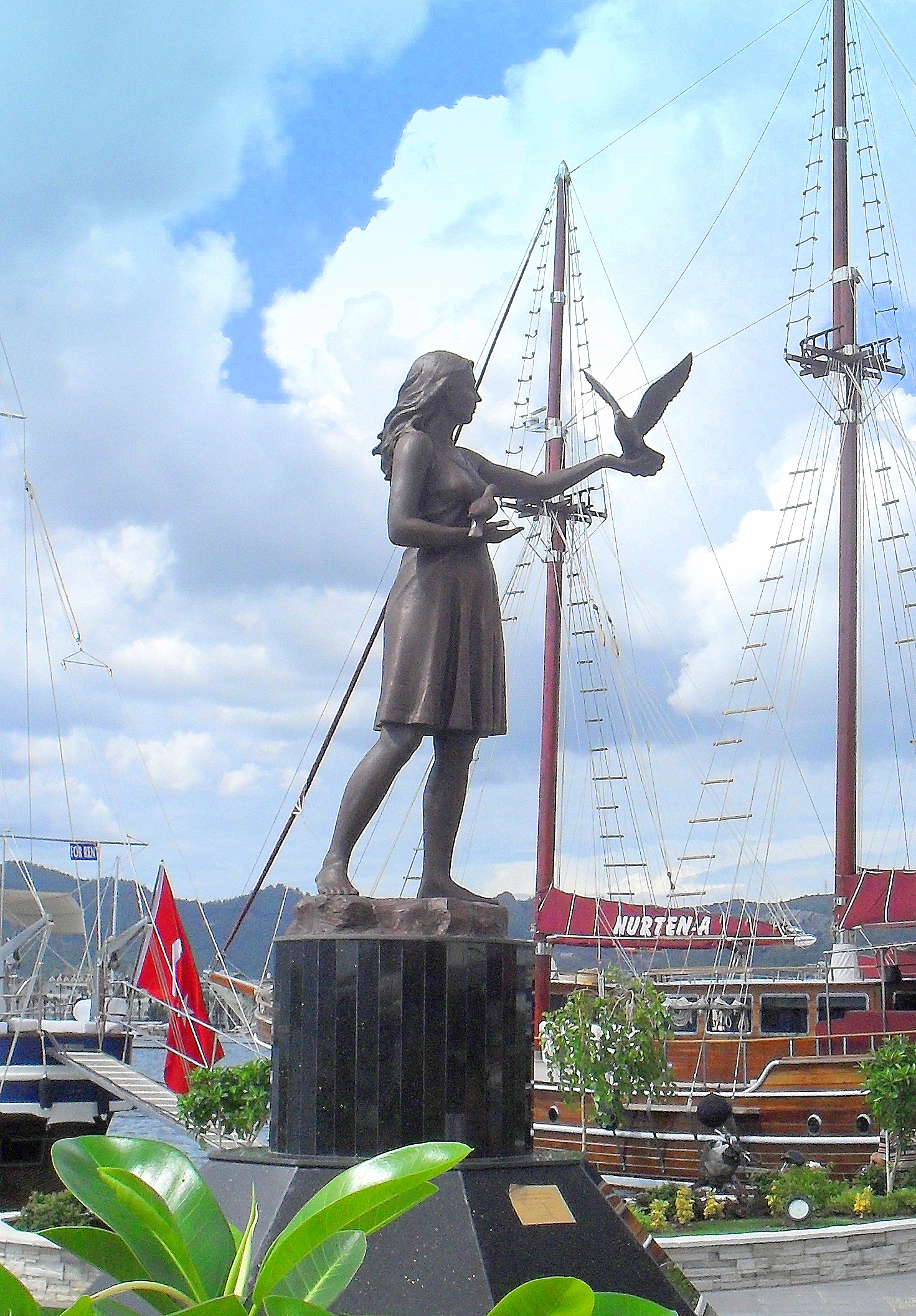 Marmaris, pomnik dziewczyny z gołębiami